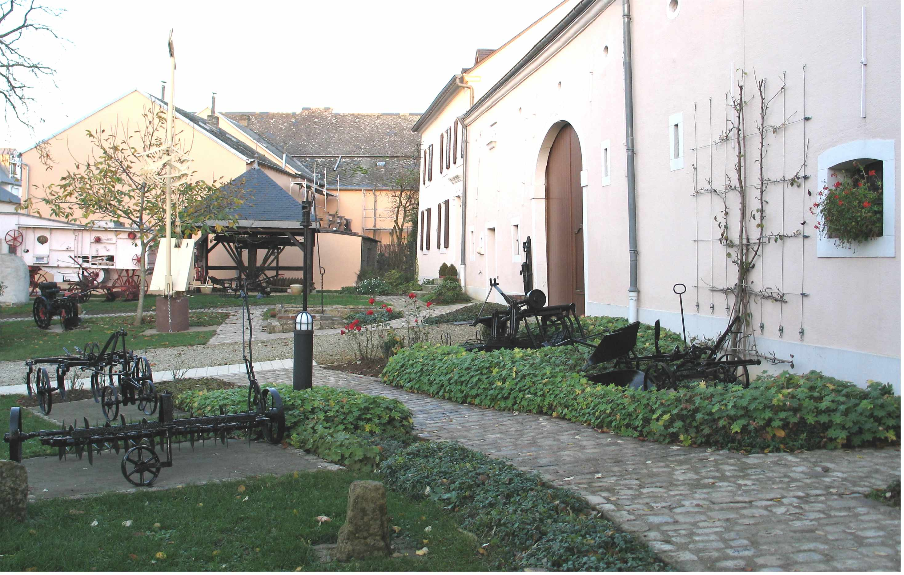 De Baueremusée vu Peppeng. Kategorie:Muséeën zu Lëtzebuerg Kategorie:Gemeng Réiser